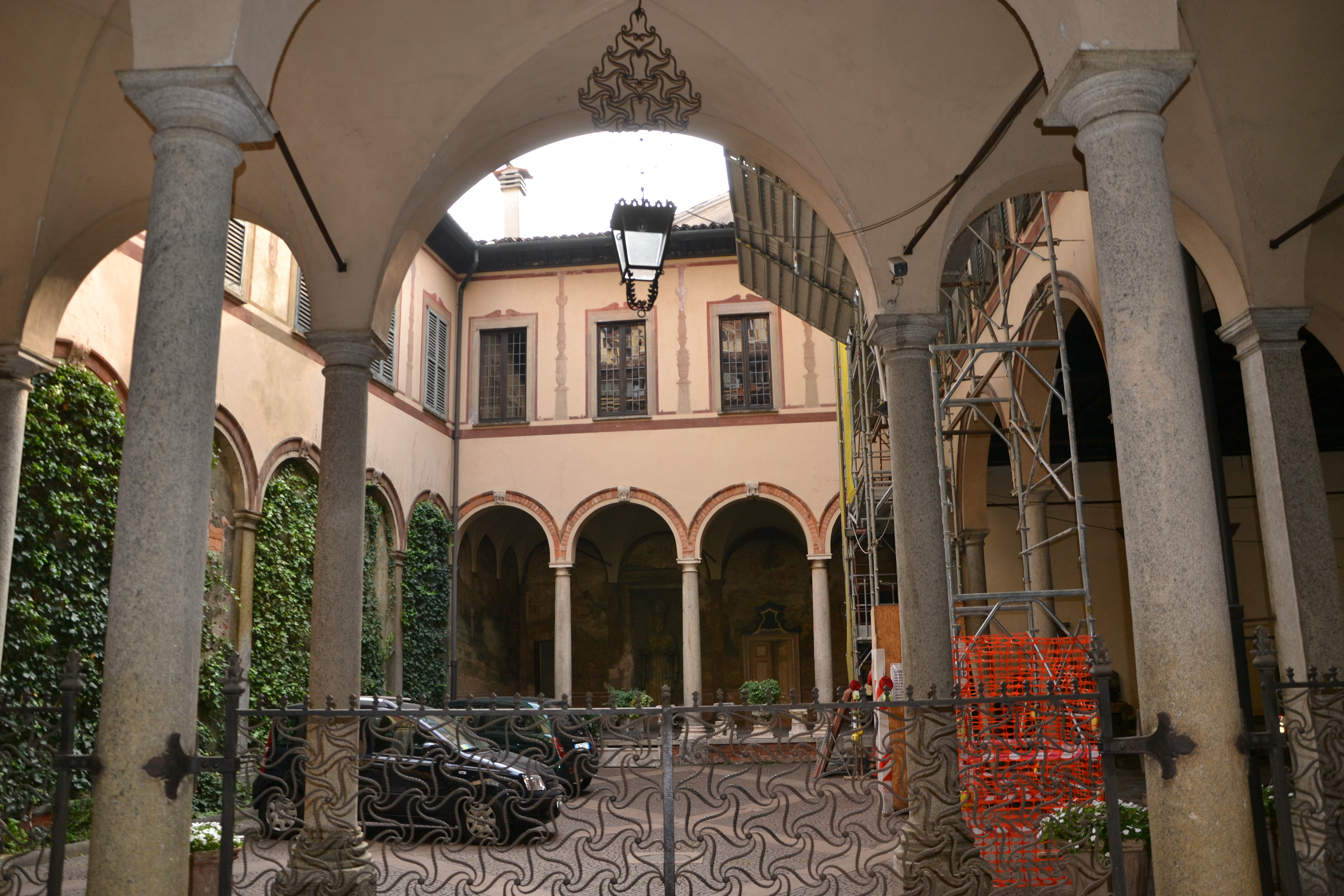 Casa degli Atellani, (Milan)